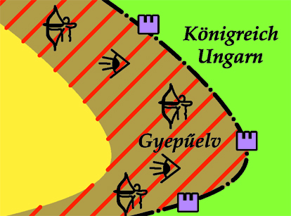 Gyepűsystem